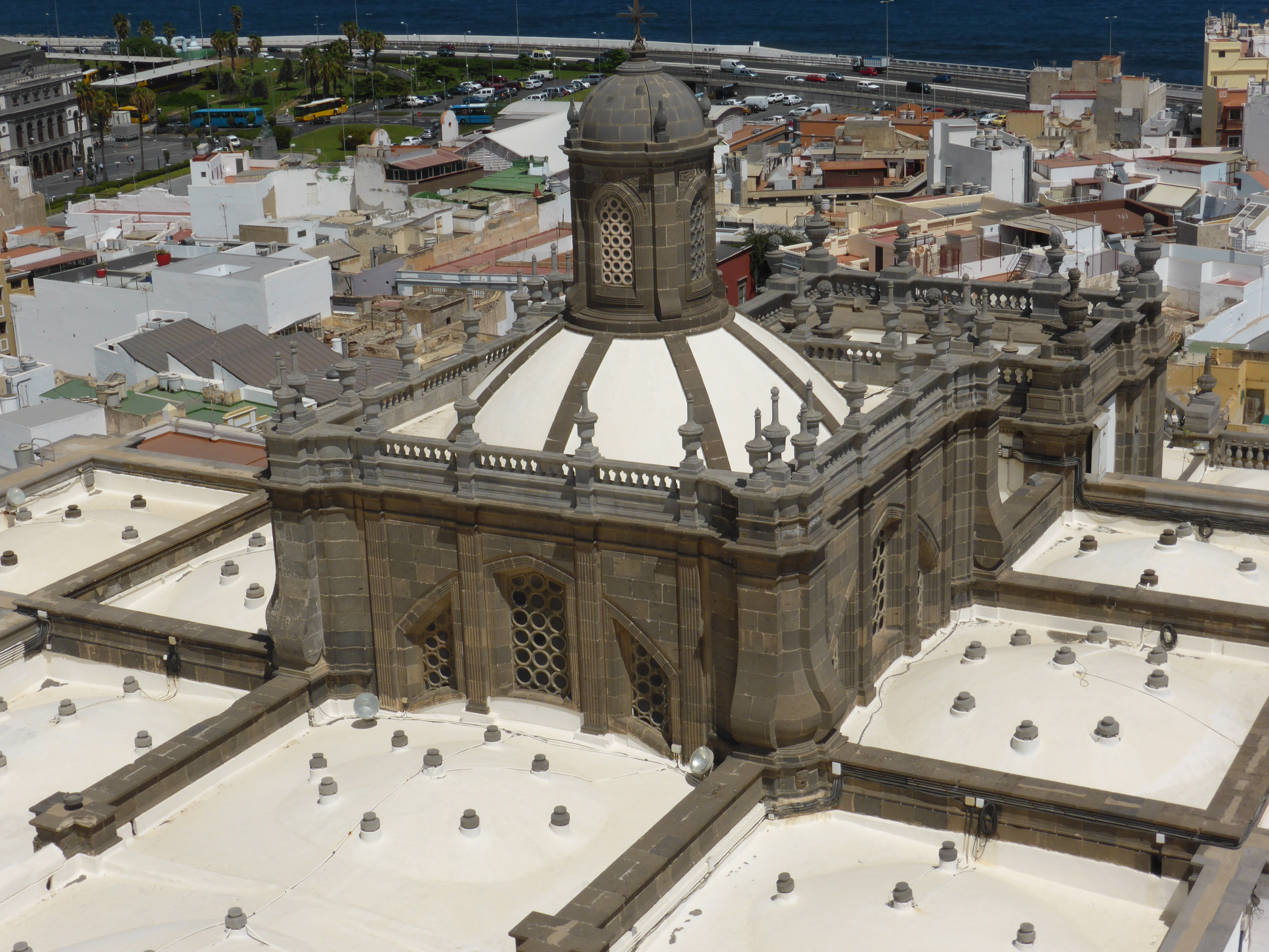 Vista exterior del cimborrio, sobre el crucero de la "Catedral Basílica de Santa Ana", que se encuentra en el barrio de Vegueta, de la ciudad de Las Palmas de Gran Canaria.